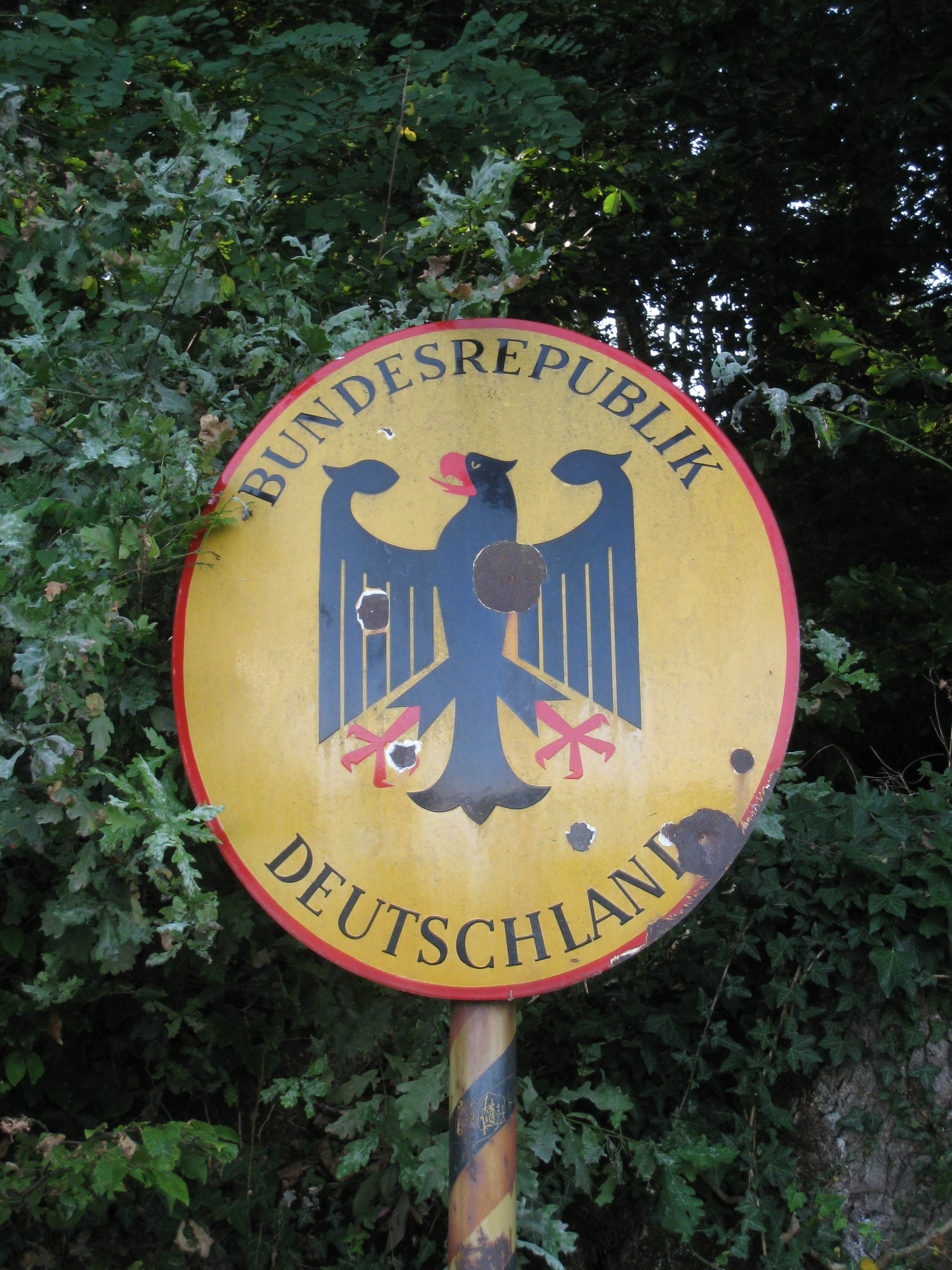 Fähre Ellikon am Rhein, Gemeinde Marthalen, deutsche Seite